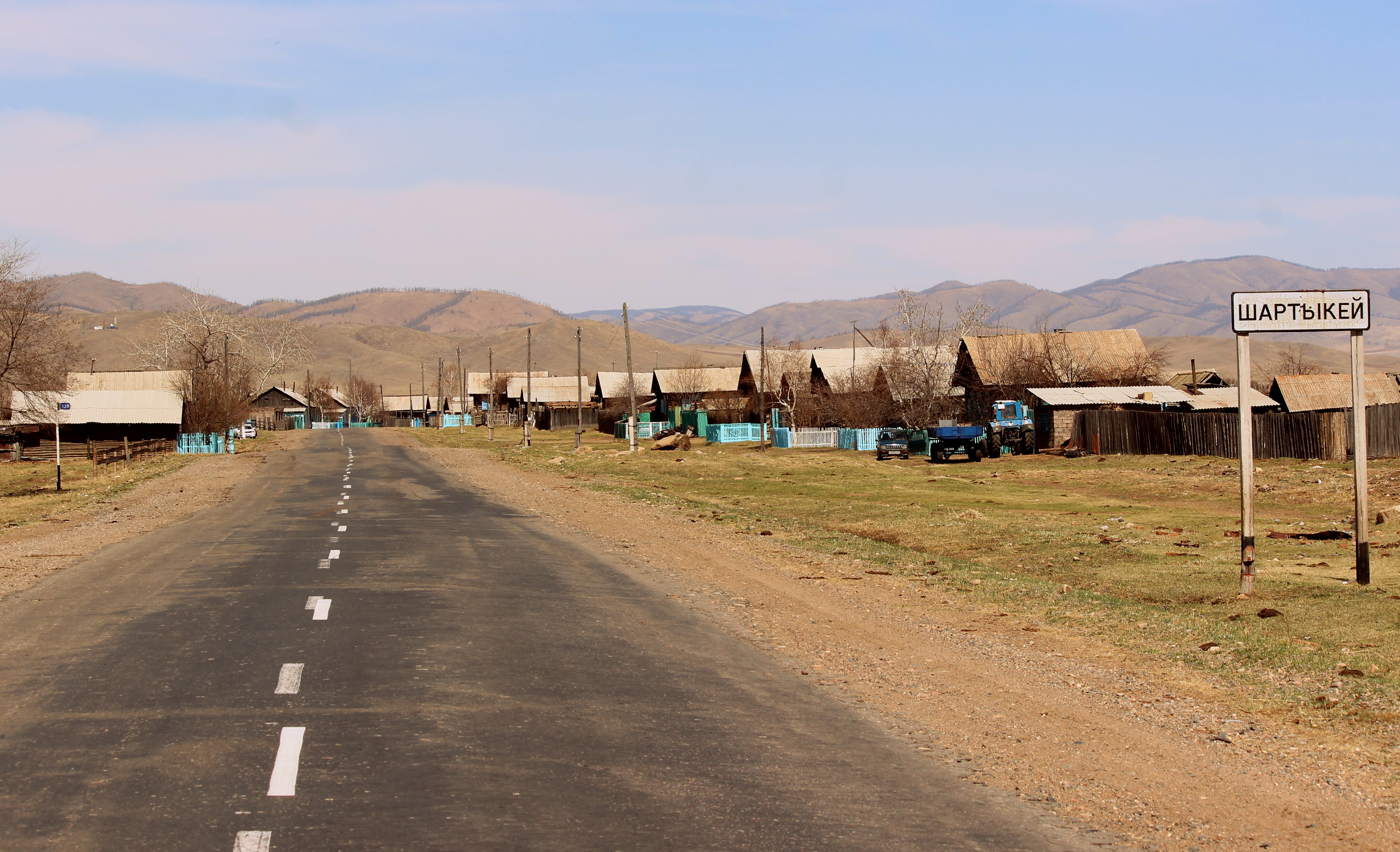 Западный въезд в село Шартыкей Джидинского района Бурятии